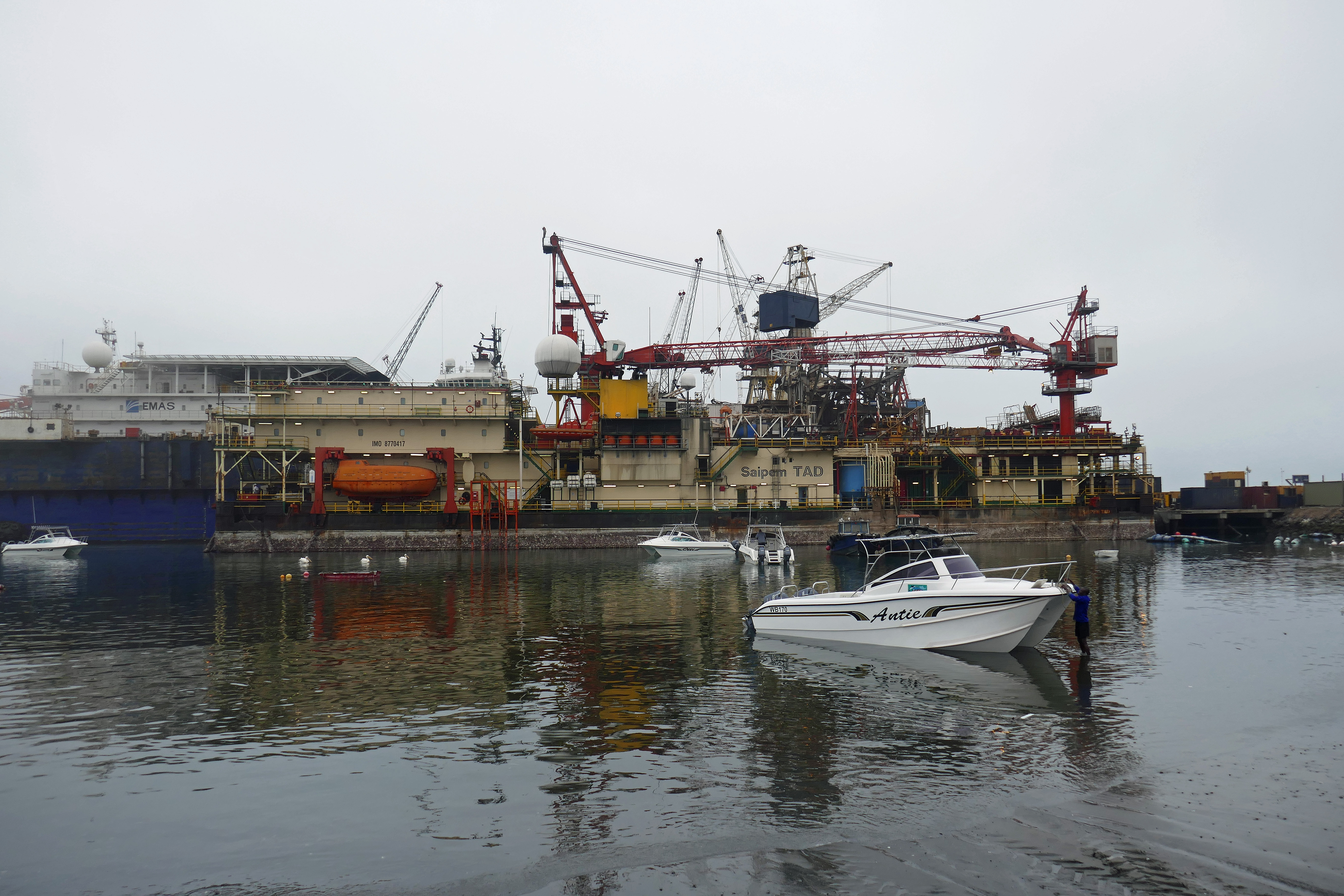 Walvis Bay (Namibie) : le port.